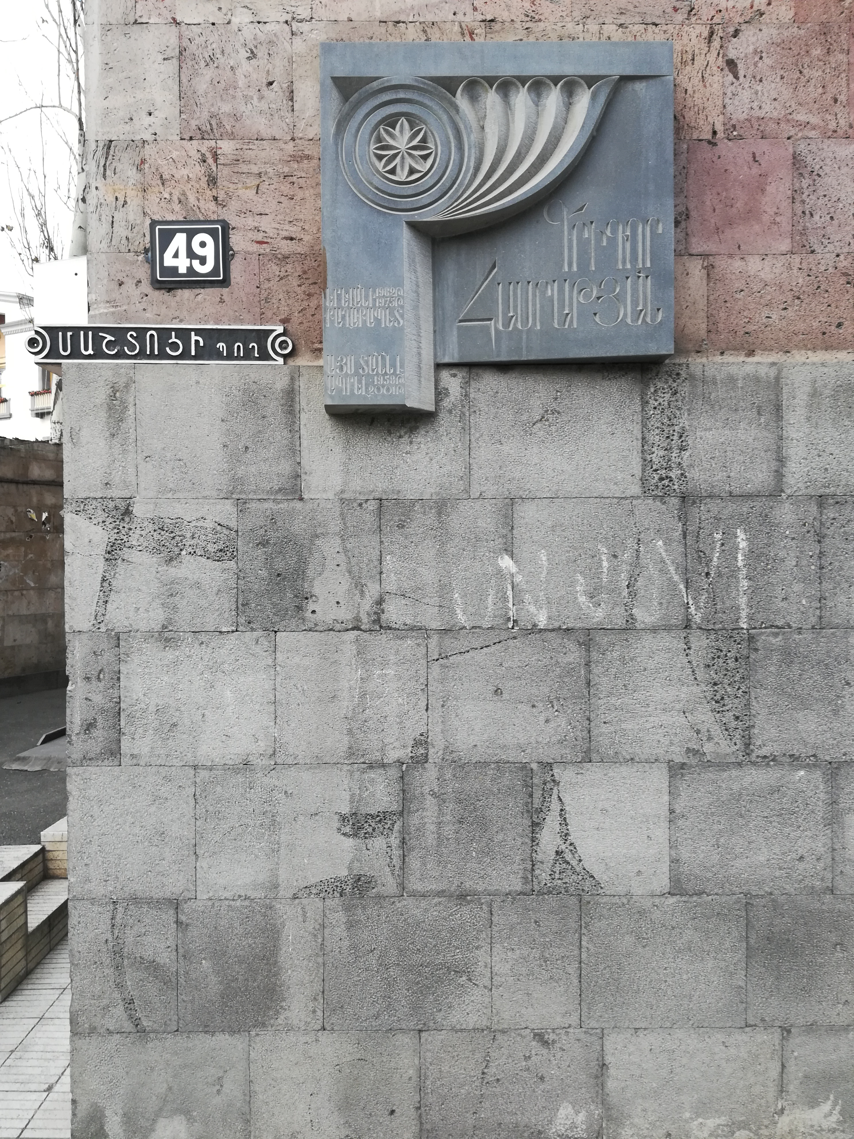 Ереван